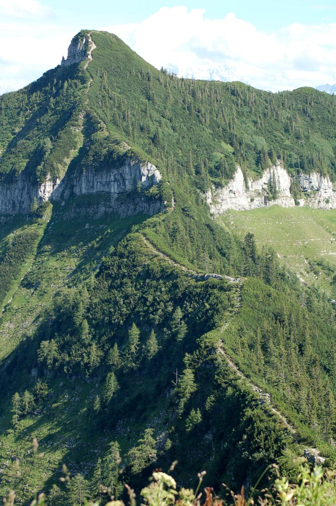 Nordwestgrat des Gruberhorns (1732 m), Aufnahme vom Regenspitz (1675 m)